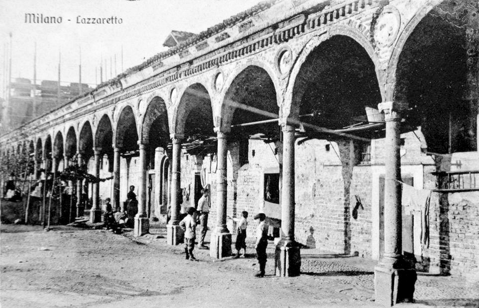 Lazzaretto di Milano in una cartolina